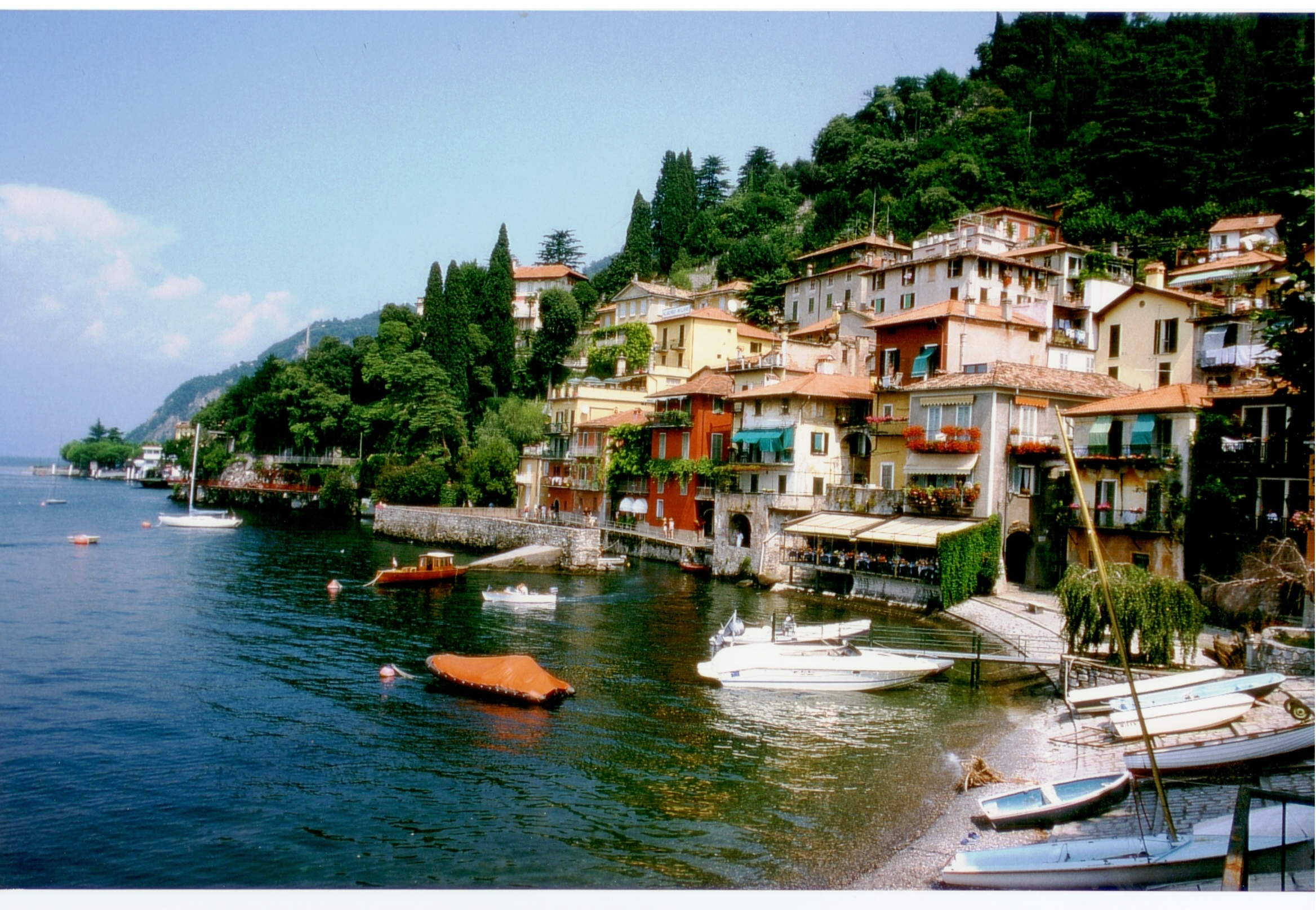 Panorama di Varenna (provincia di Lecco) dal lago.